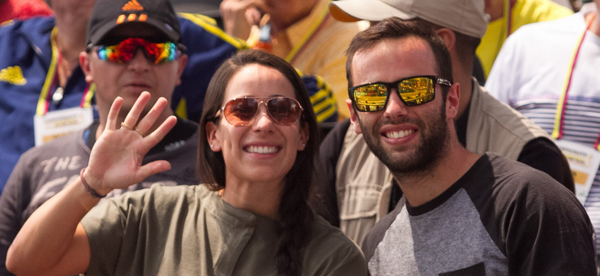 Mariana Pajón y Vincent Pelluard Campeonato Nacional de Ruta 2018 Medellín, febrero 4 de 2018.